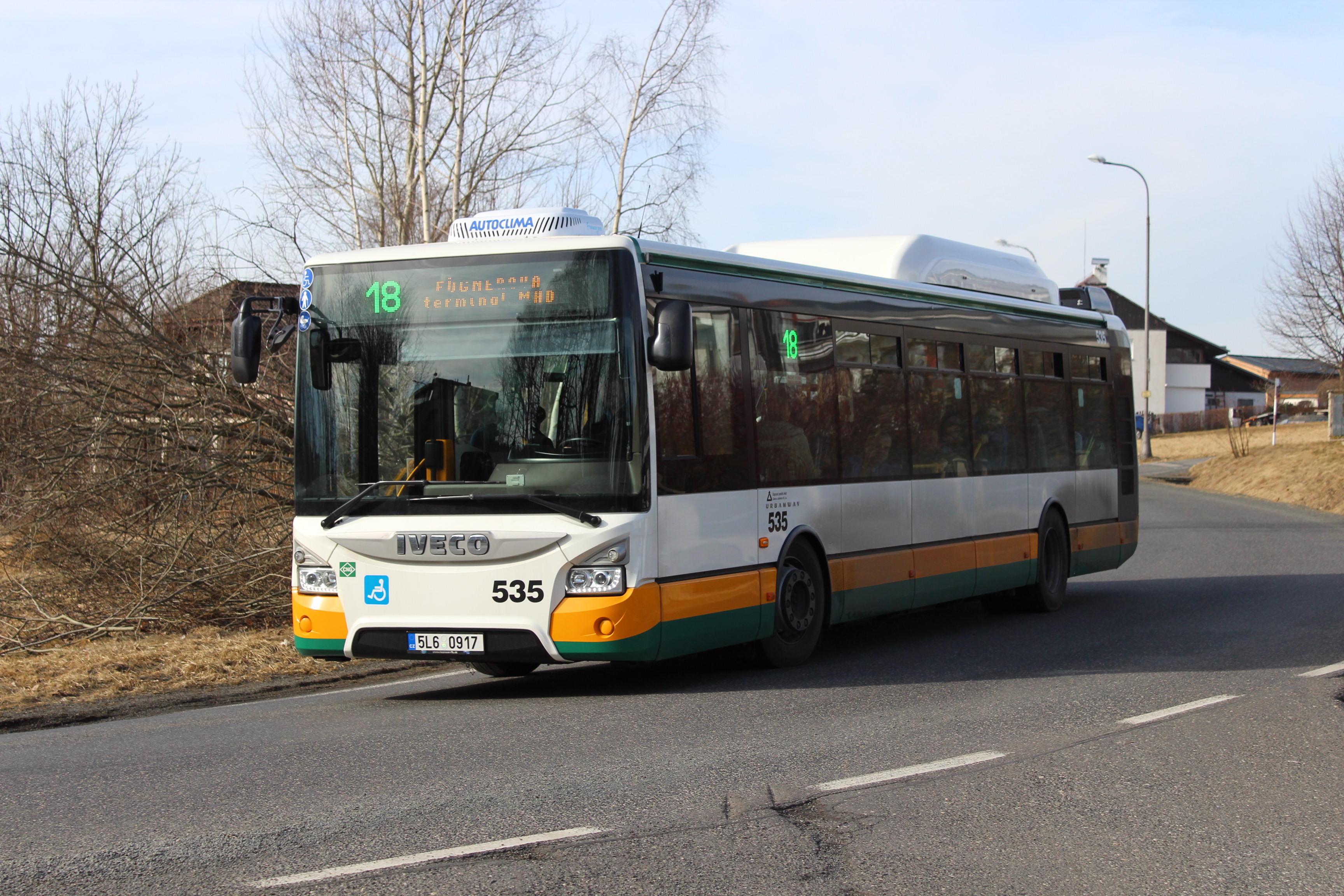 Iveco Urbanway 12M CNG ev.č. 535 na lince 18 v Liberci u zastávky U Pramenů